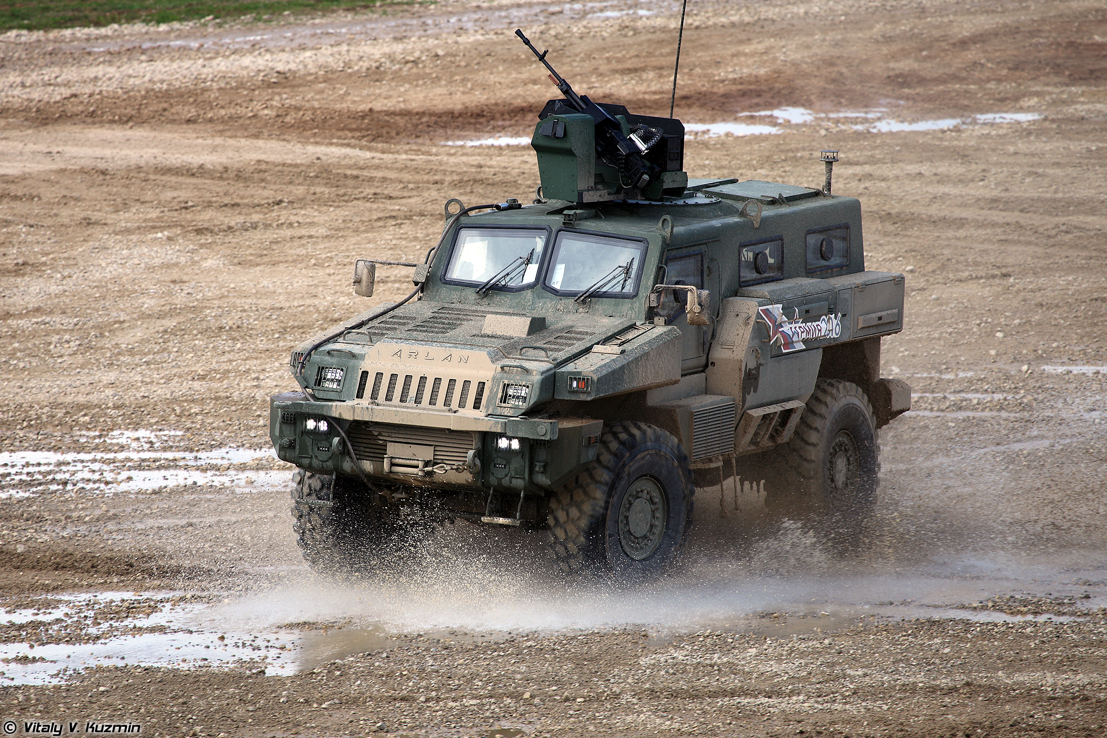 Бронеавтомобиль Арлан (Arlan armored vehicle)